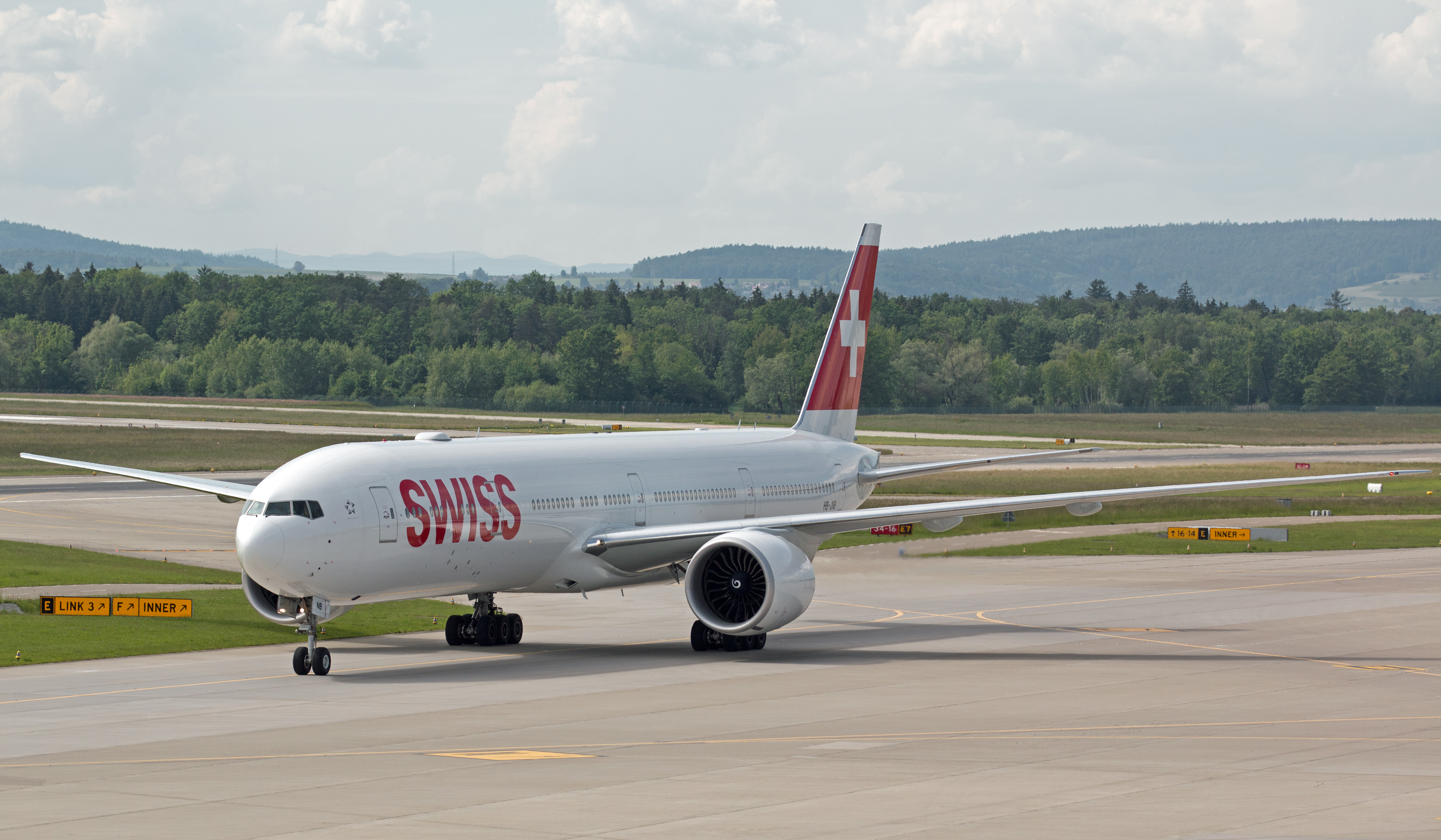 Boeing B777-3DEER First flight date 08.03.2016